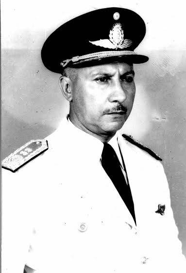 El Brigadier General Juan Francisco Fabri.